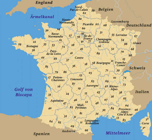 Karte der französischen Départements mit Regionen